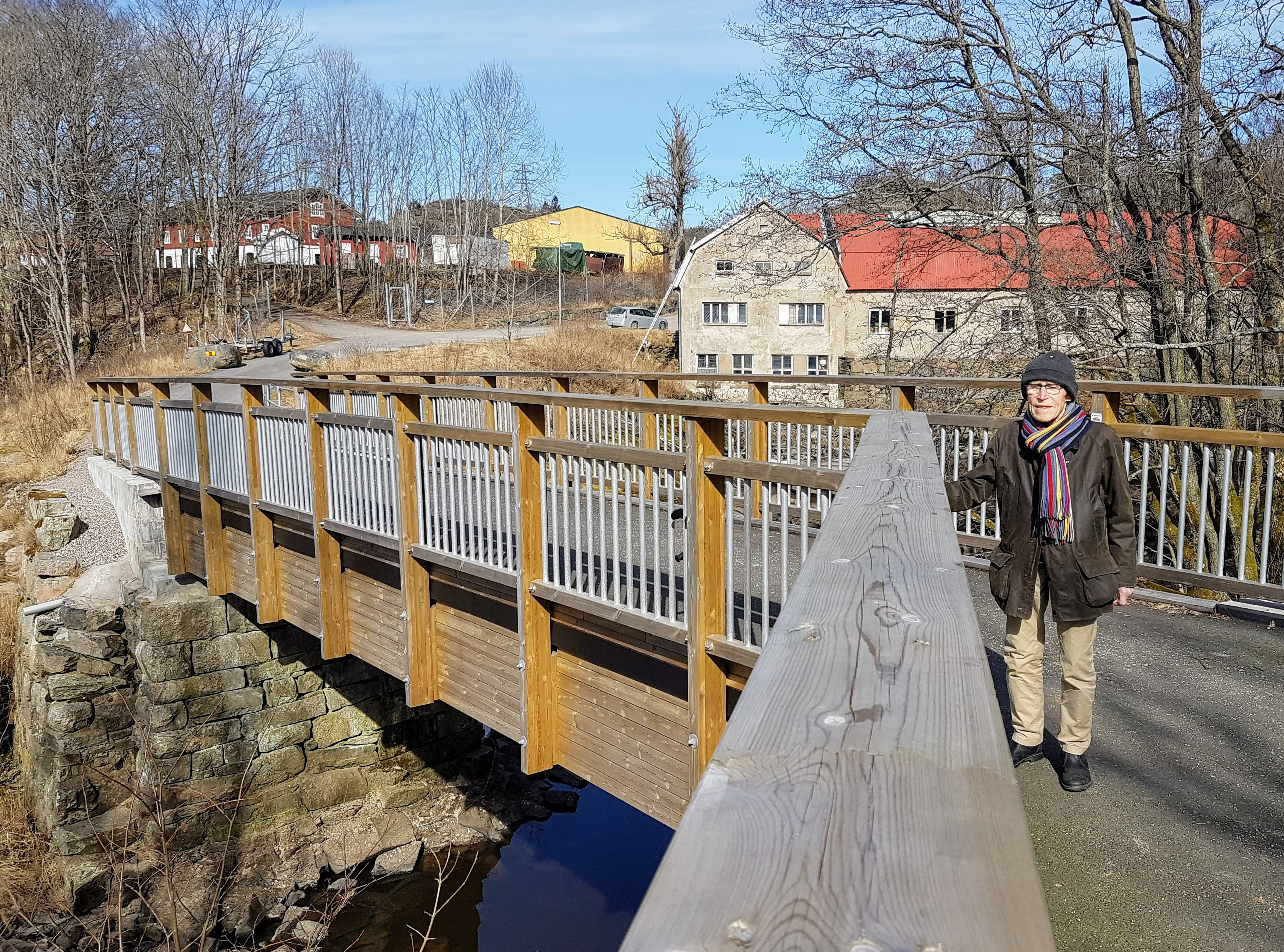 Ögonläkare Hans Ryberg vid Hasses Bro över Bäveån, på promenadstråket från Byfjorden upp till Skalbankarna. Hans hann själv få nytta av sin fina bro.